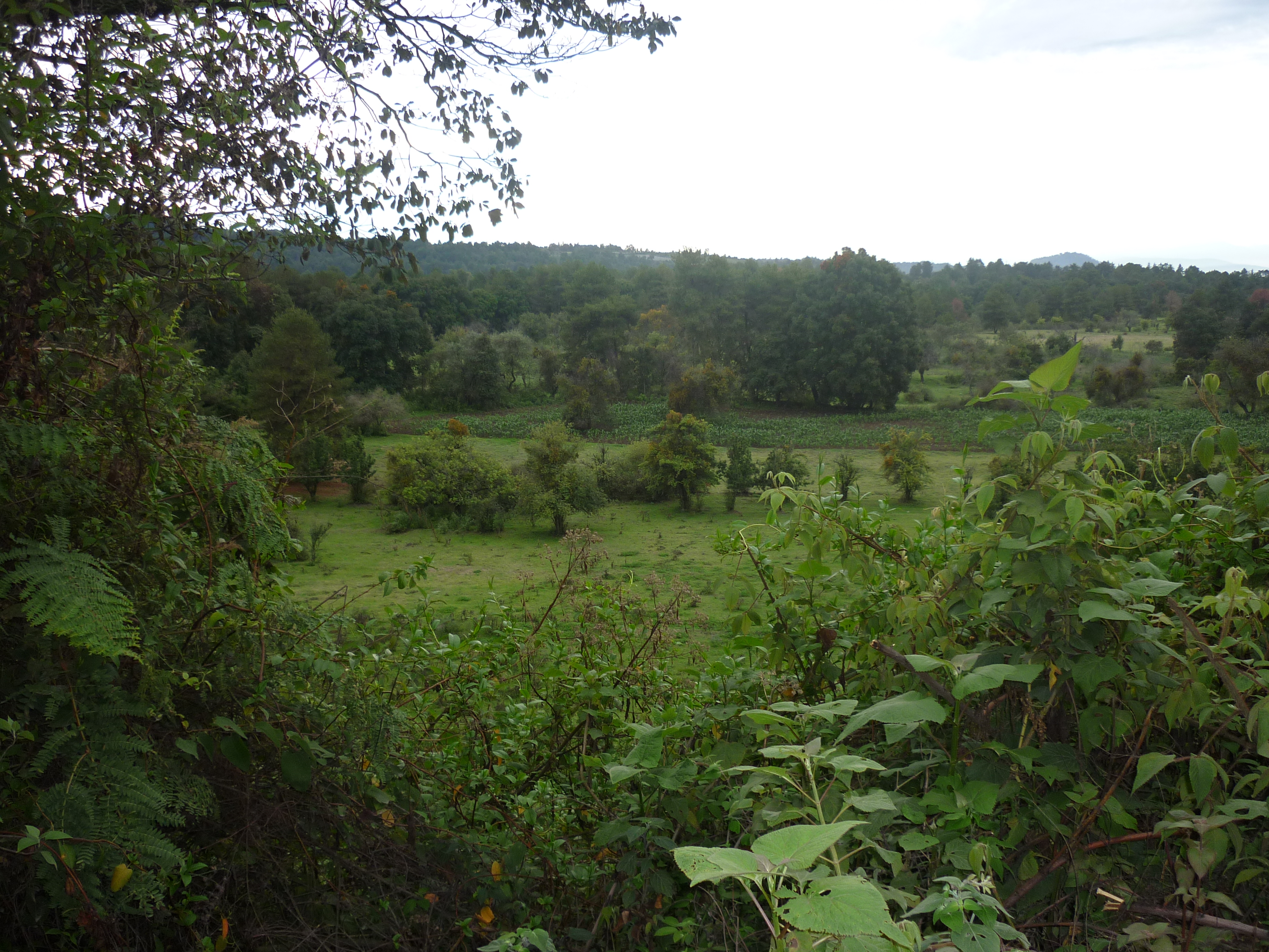 Flora del Monte de Atlautla